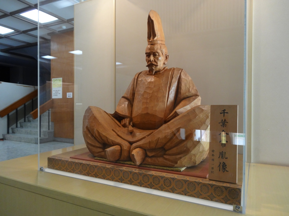 千葉常胤像